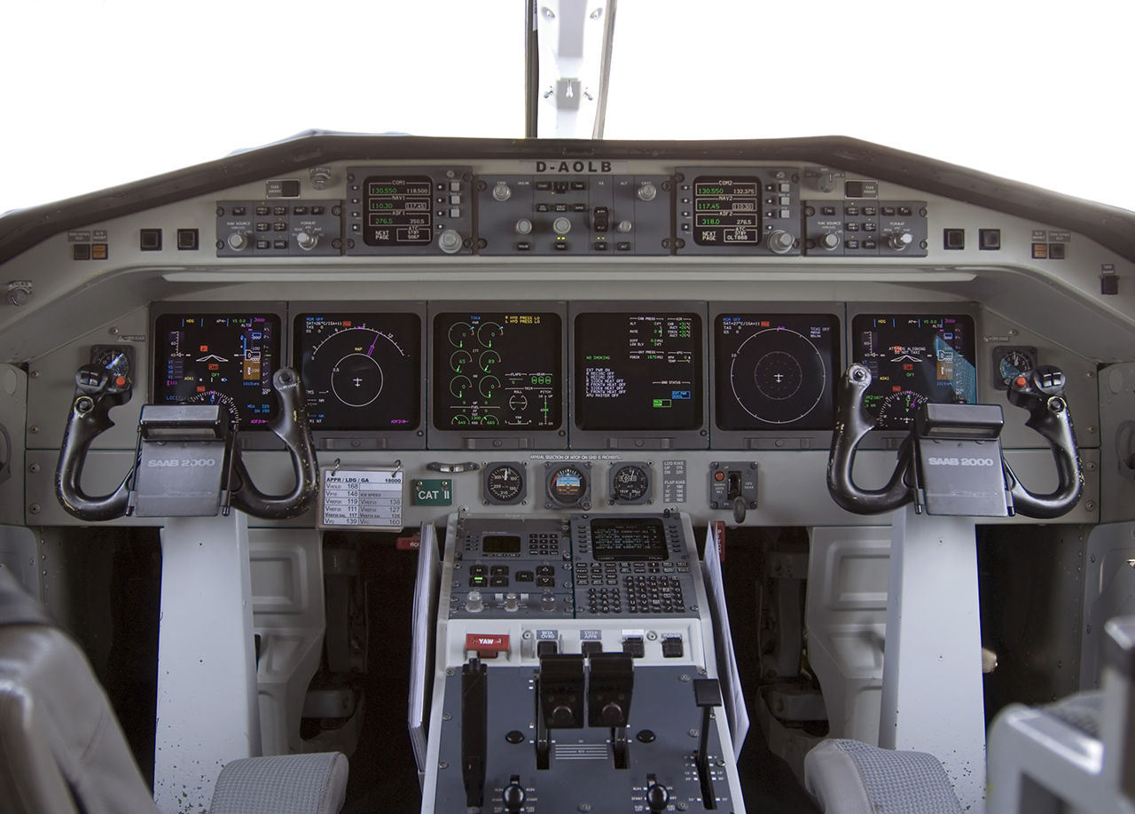 "OLT" Saab2000 D-AOLB